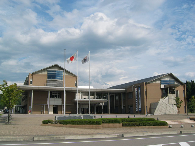 能美市役所 辰口庁舎 合併によりja:能美市が誕生する前までは、辰口町の町役場だった。 Contents 1 データ 2 関連画像 3 Licensing 4 Licensing 5 Original upload log データ 撮影者 Shift 撮影日 2005年09月 撮影地 石川県能美市来丸町 関連画像 能美市役所 寺井庁舎 Licensing Category:石川県の官公庁画像